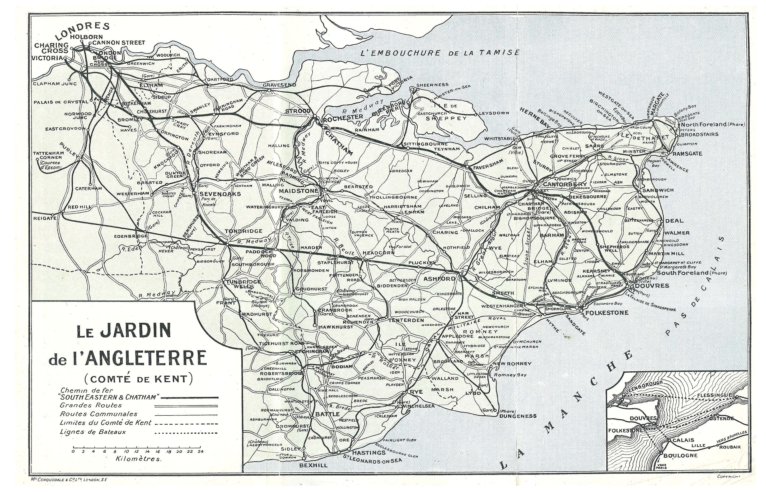 Carte du Jardin de l'Angleterre (Comté de Kent) avec le trajet des Chemins de fers South Eastern & Chatham, au début du XXe siècle (avant 1914).